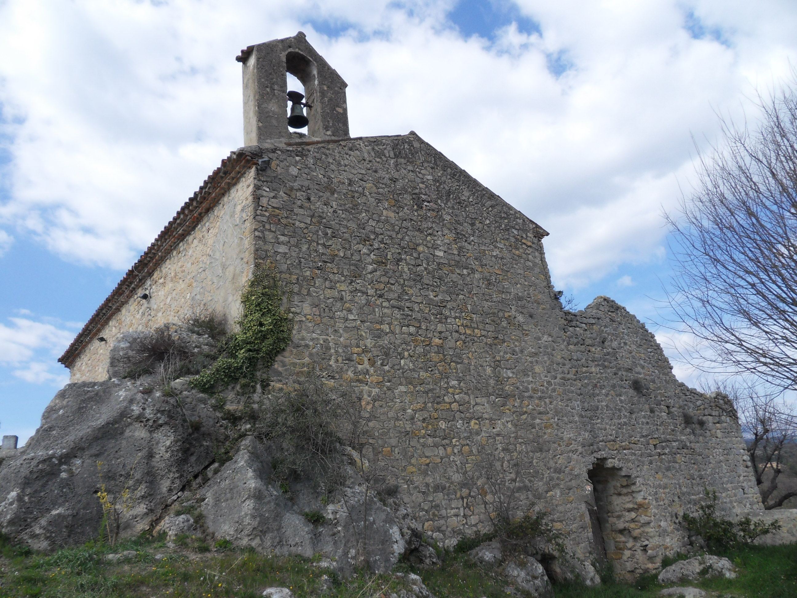 Montauroux (Chapelle Saint-Barthélémy)